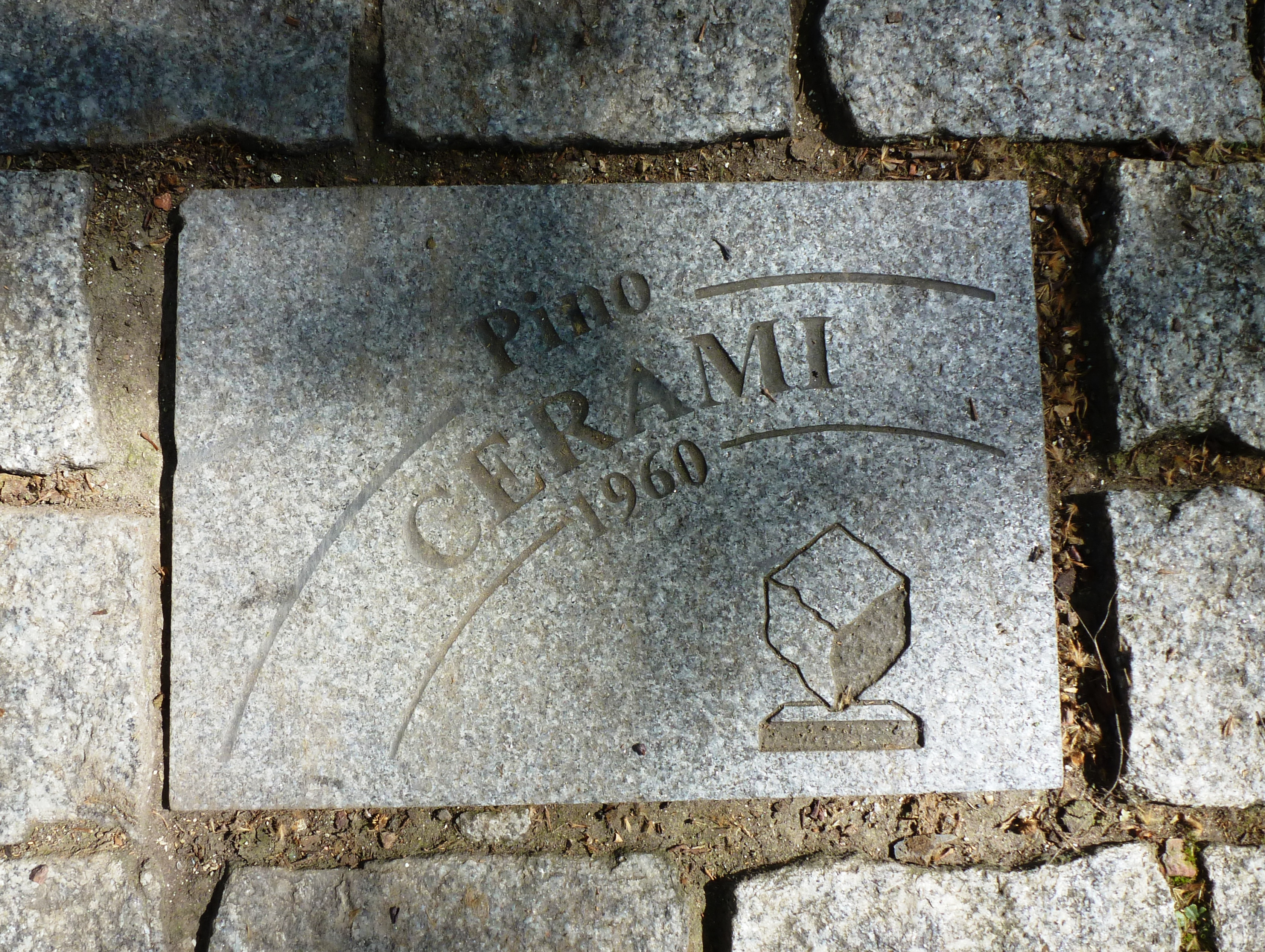 Pflasterstein für Pino Cerama auf der Allée Charles Crupelandt in Roubaix